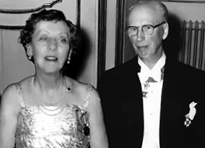 Josef Anér och hans hustru Gunvor, född Löfvendahl, upprättade år 1960 en stiftelse, som erhöll namnet ”Gunvor och Josef Anérs stiftelse”, och skänkte densamma ett betydande kapital.